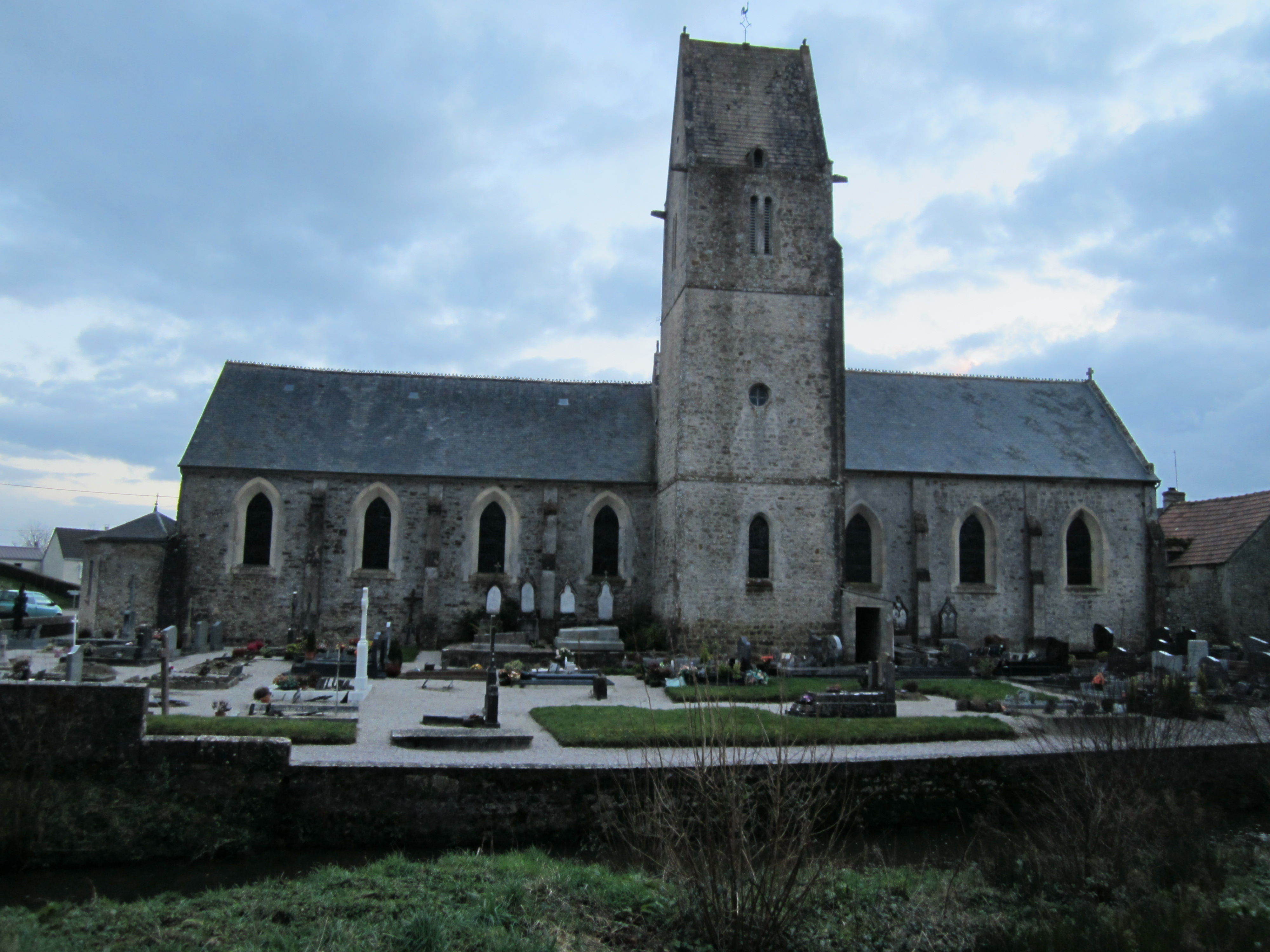 Église Saint-Germain de Saint-Germain-de-Tournebut